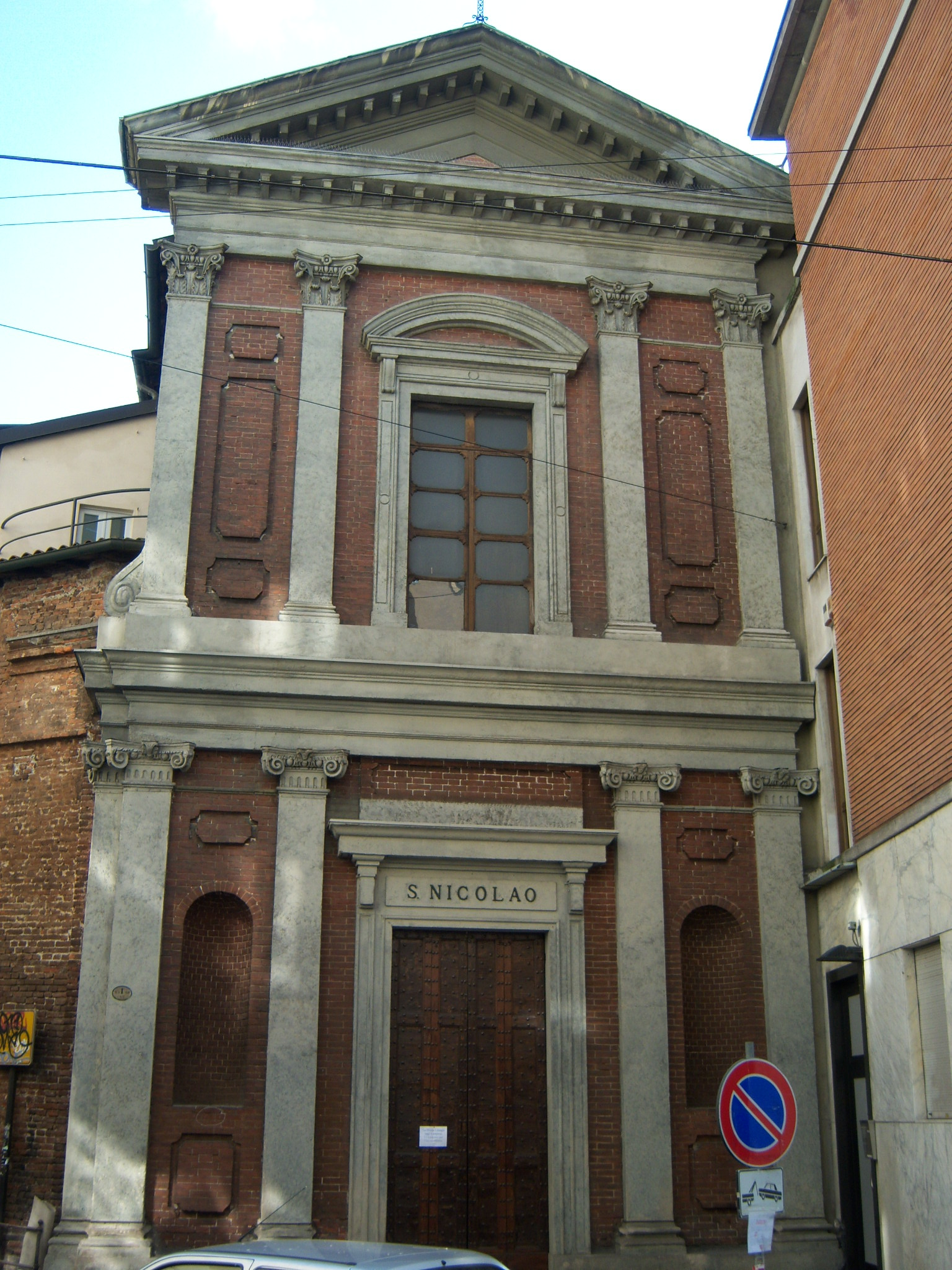 San Nicolao a Milano